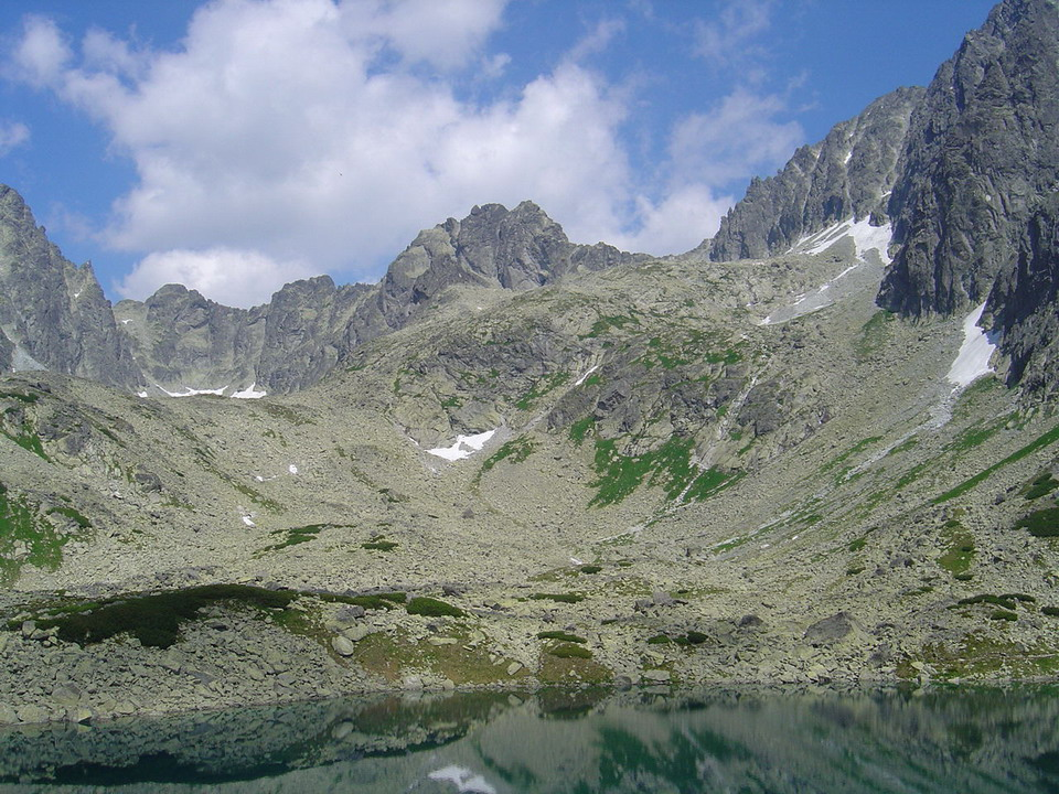 Popradsky Ladovy stit, Kacaci stit and Batizovsky stit over Batizovske pleso